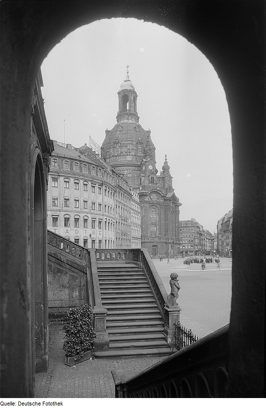 Original image description from the Deutsche Fotothek Blick von der Freitreppe des Johanneums über den Neumarkt gegen die Frauenkirche